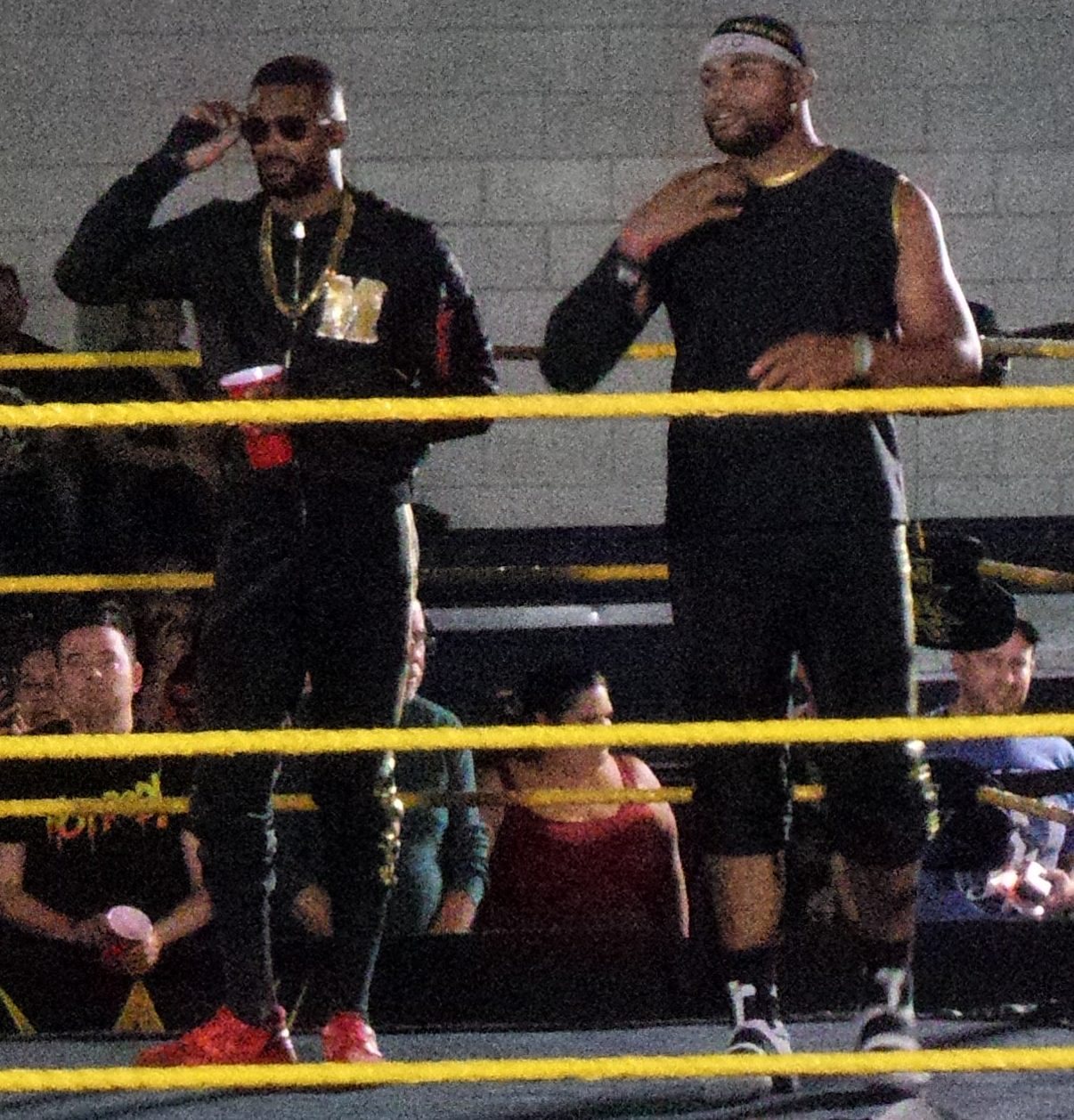 P_20170505_193441_002